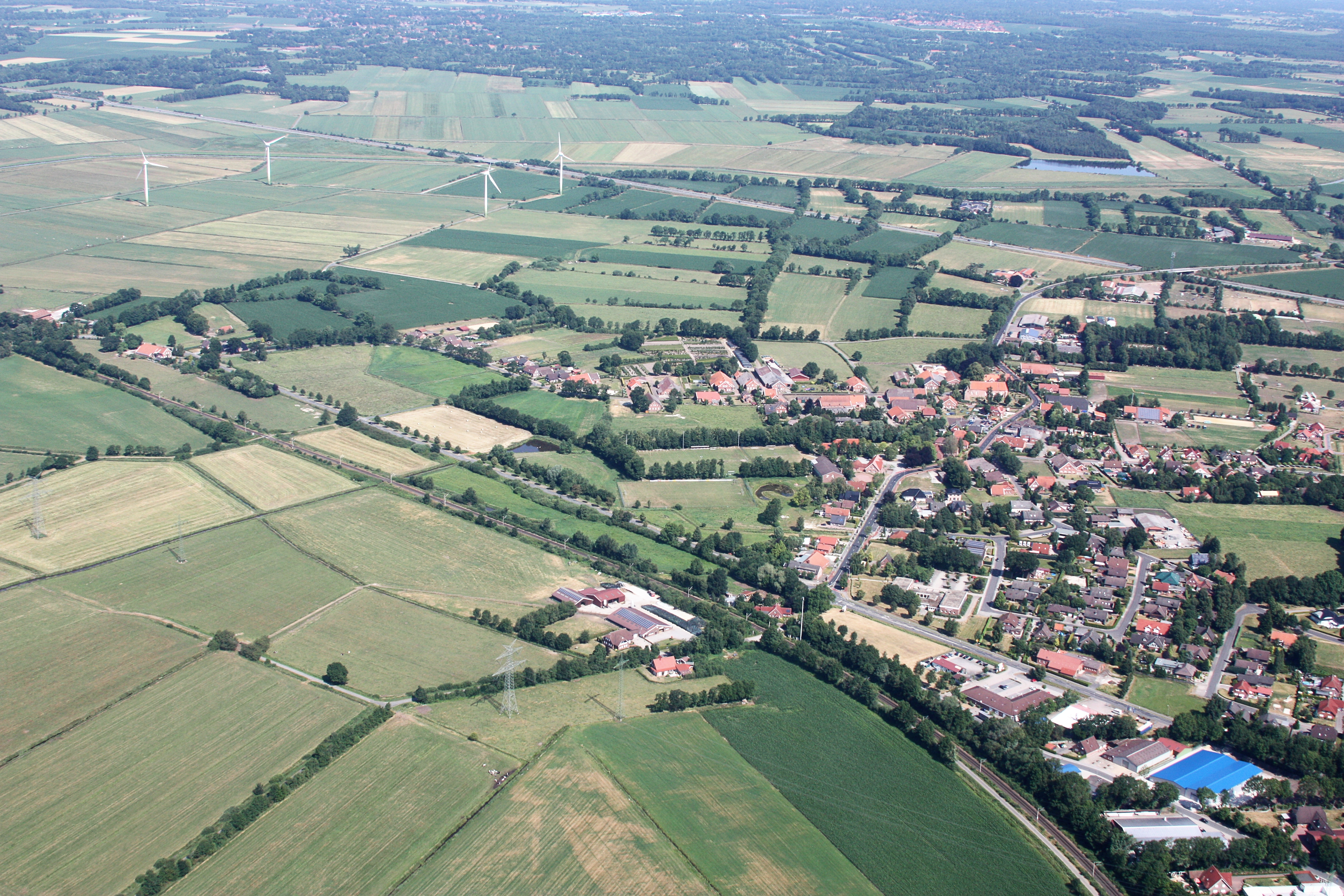 Luftaufnahme; Flug von Westerstede nach Leer; Flughöhe 1500 ft; Juli 2010; Originalfoto bearbeitet: Tonwertkorrektur und Bild geschärft mit Hochpassfilter